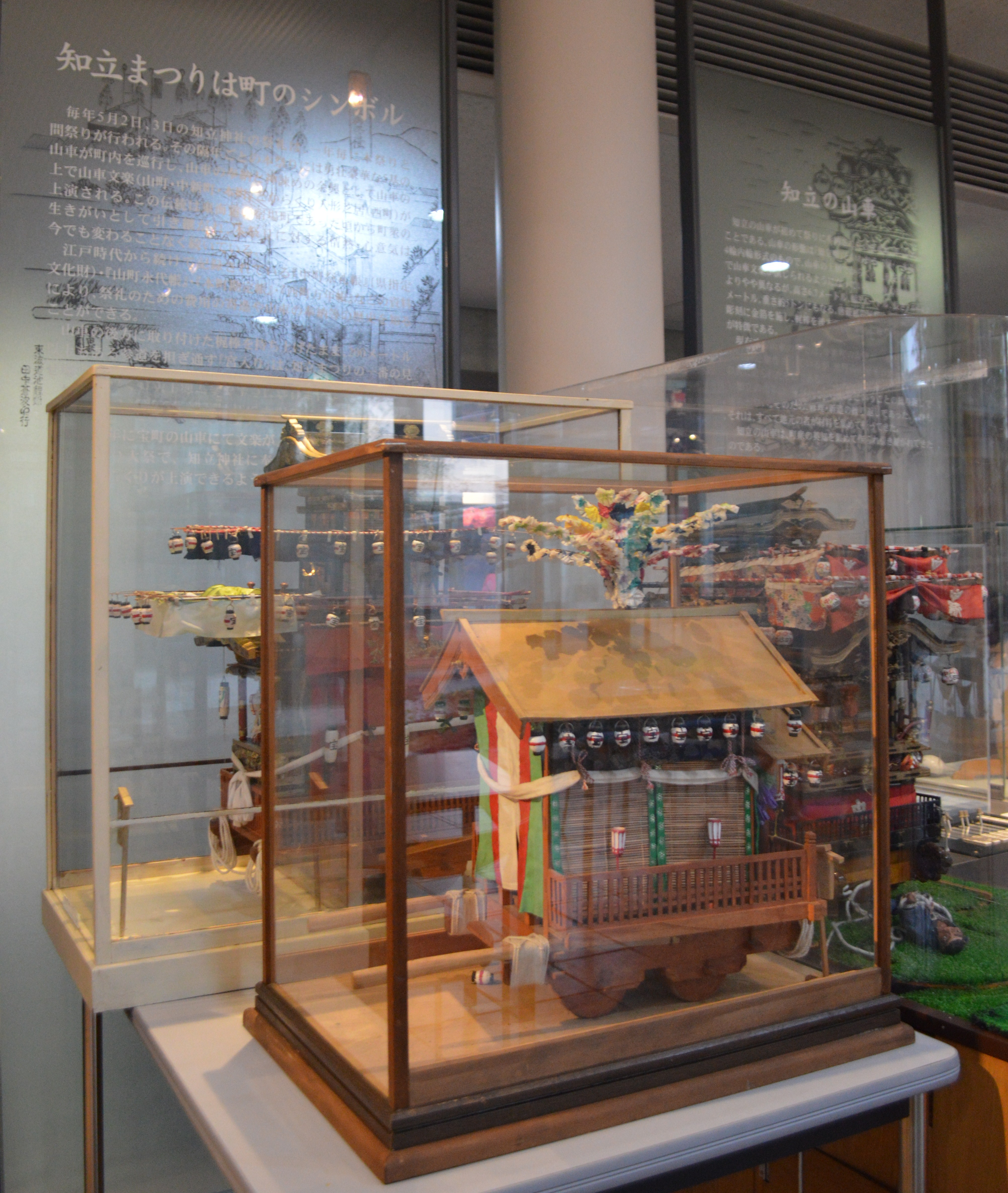 愛知県知立市の文化施設、パティオ知立にある知立まつりの展示物。